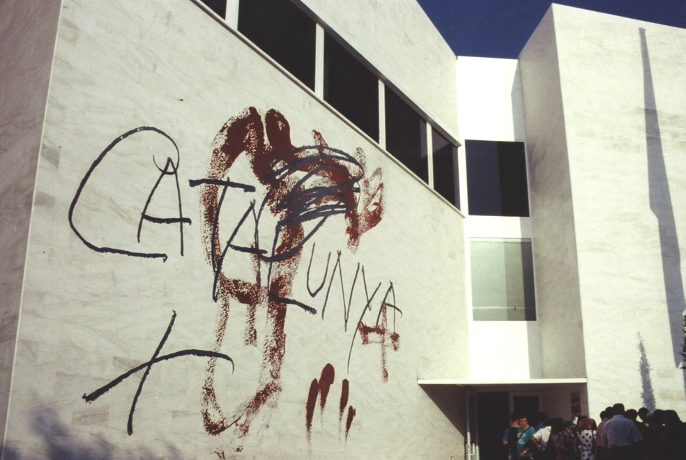 Pavelló de Catalunya a l'Expo de Sevilla de 1992